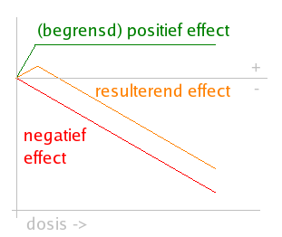 Een verklaring voor hormesis: bij lage dosis overheerst het effect van het positieve werkingsmechanisme, bij hoge dosis dat van het negatieve mechanisme.